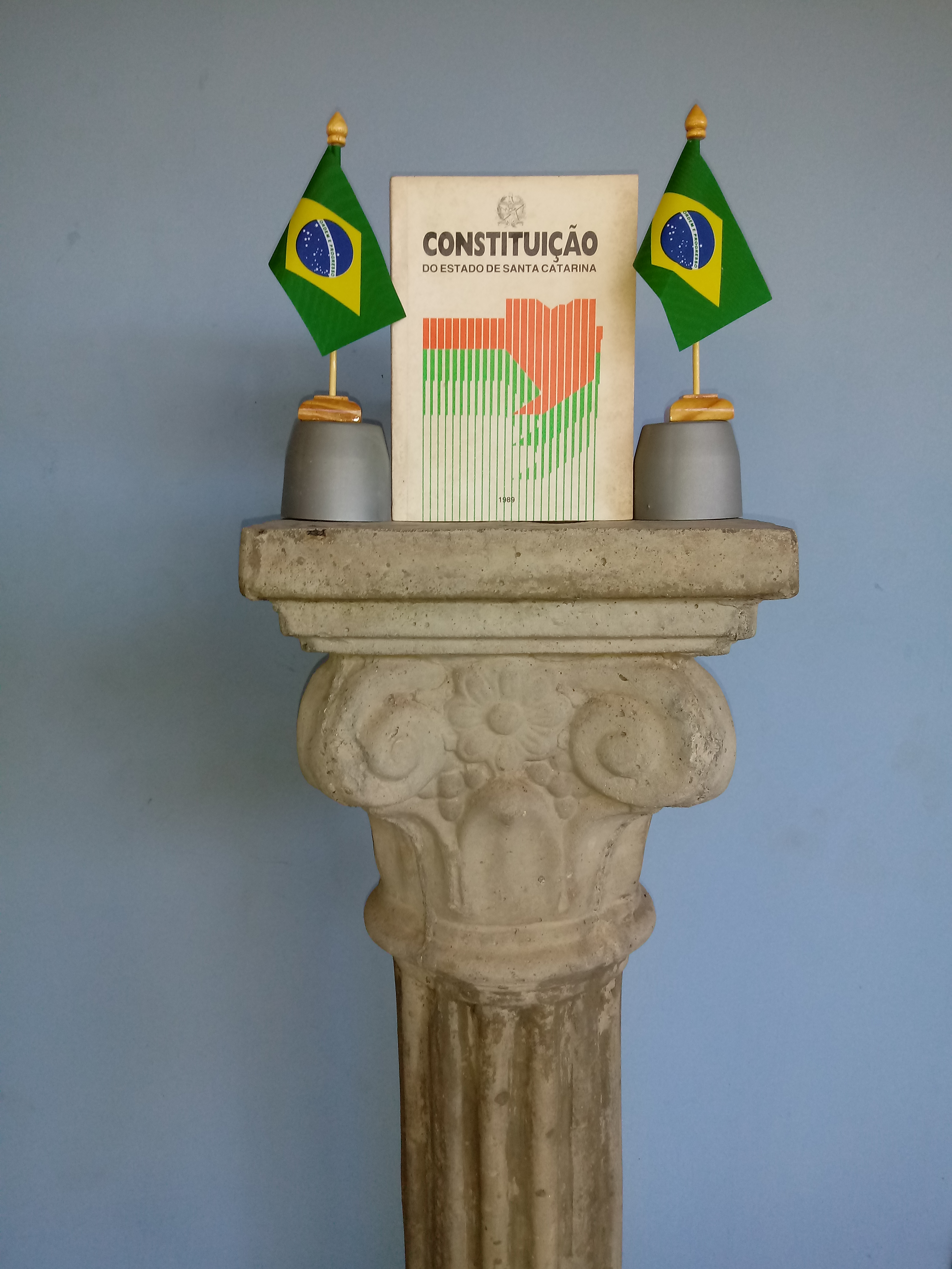 Coluna de decoração de ambientes interno com Constituição do Estado de Santa Catarina.